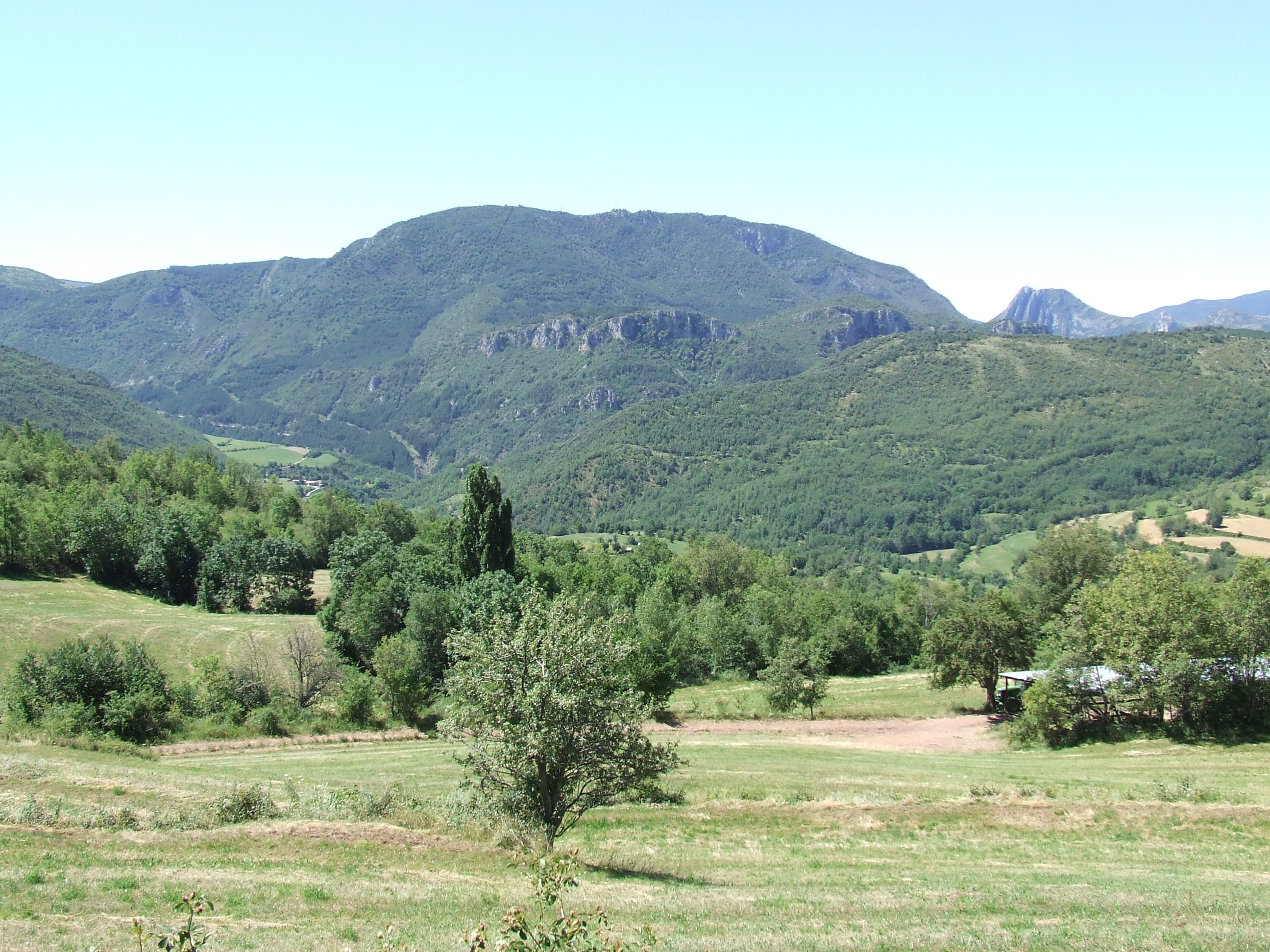 Les costes de Montiberri, des de Malpàs (el Pont de Suert, Alta Ribagorça)